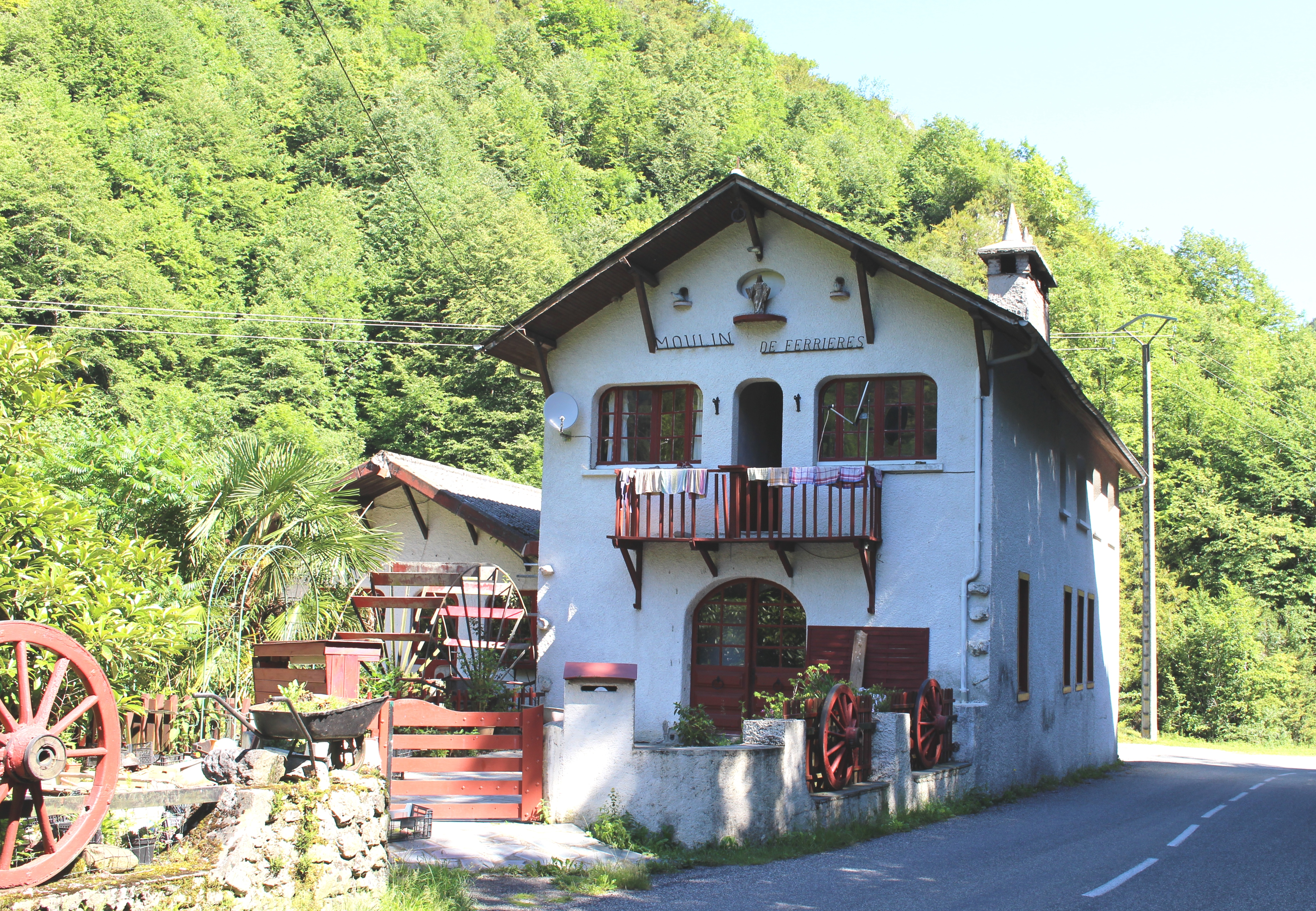 Moulin de Ferrières (Hautes-Pyrénées)